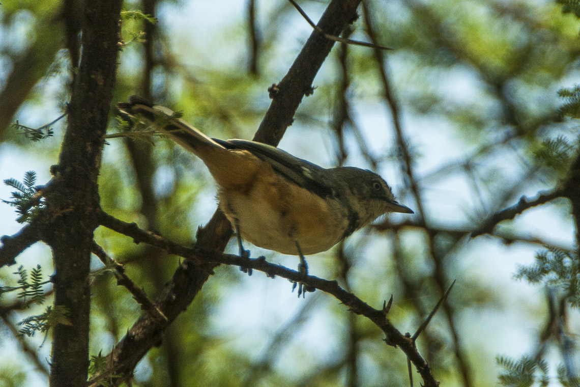 Banded Warbler - Lake Manyara - Tanzania_7999